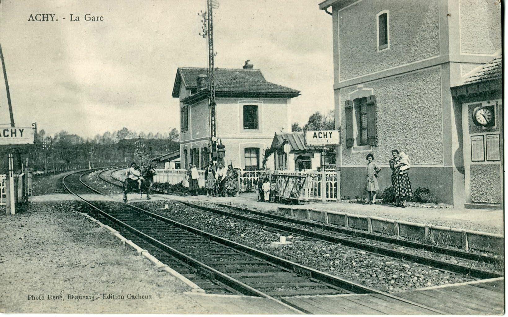 Carte postale ancienne éditée par René à Beauvais ACHY : la Gare